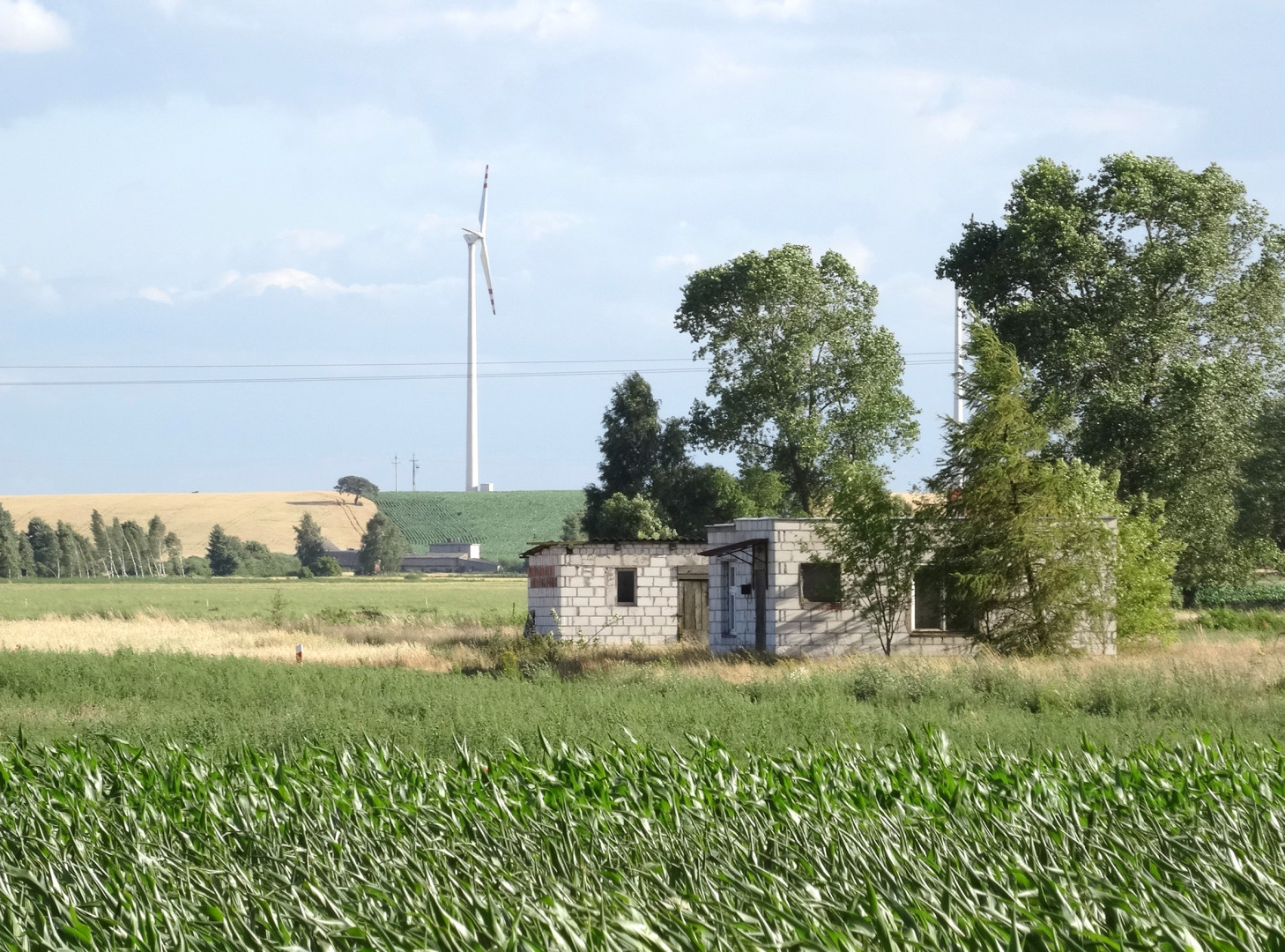 Pola uprawne i krajobraz we wsi Dąbrowa Wielka, gmina Nowa Wieś Wielka, powiat bydgoski